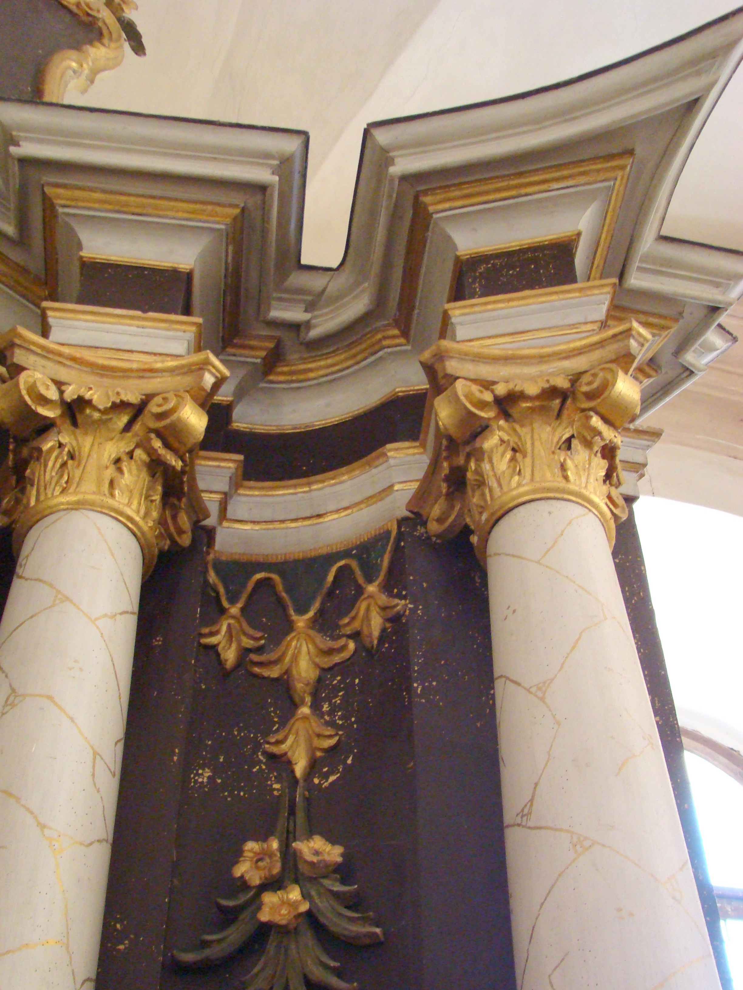 Biserica evanghelică, sat Zagăr; comuna Zagăr, județul Mureș 01